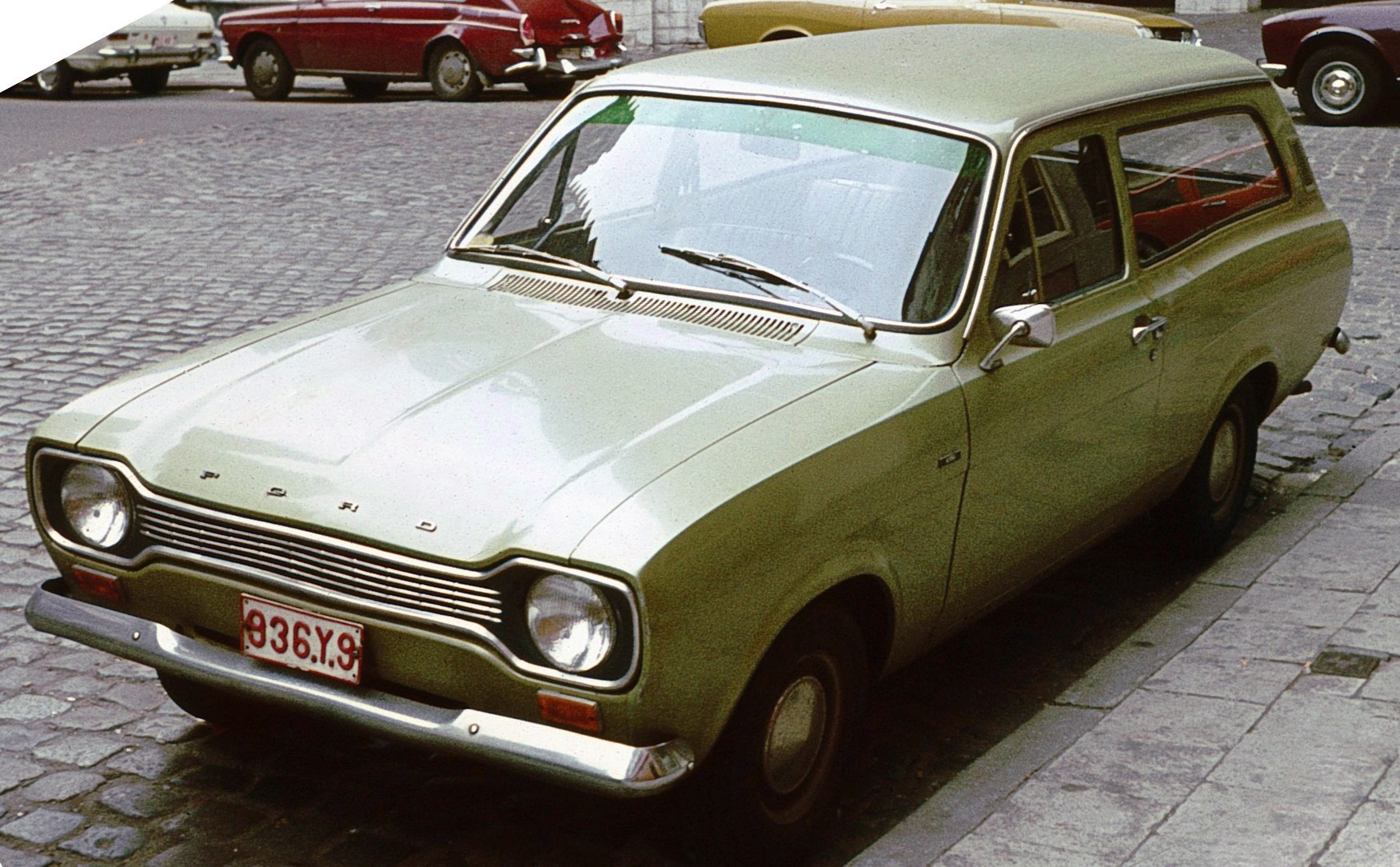 First generation Ford Escort Estate Bj. ca. 1970